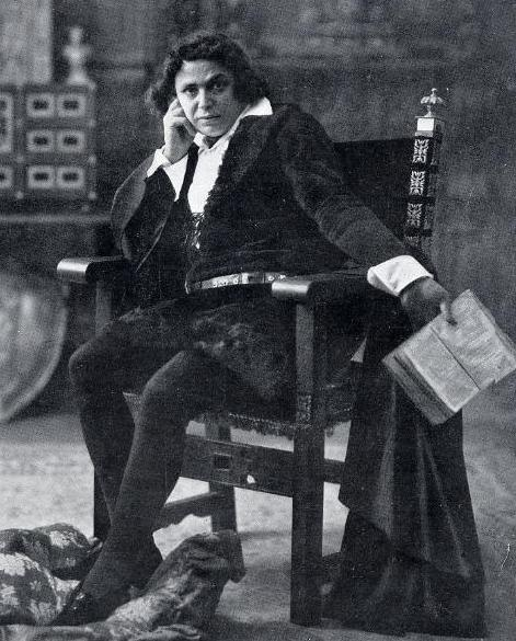 El actor español José Tallaví